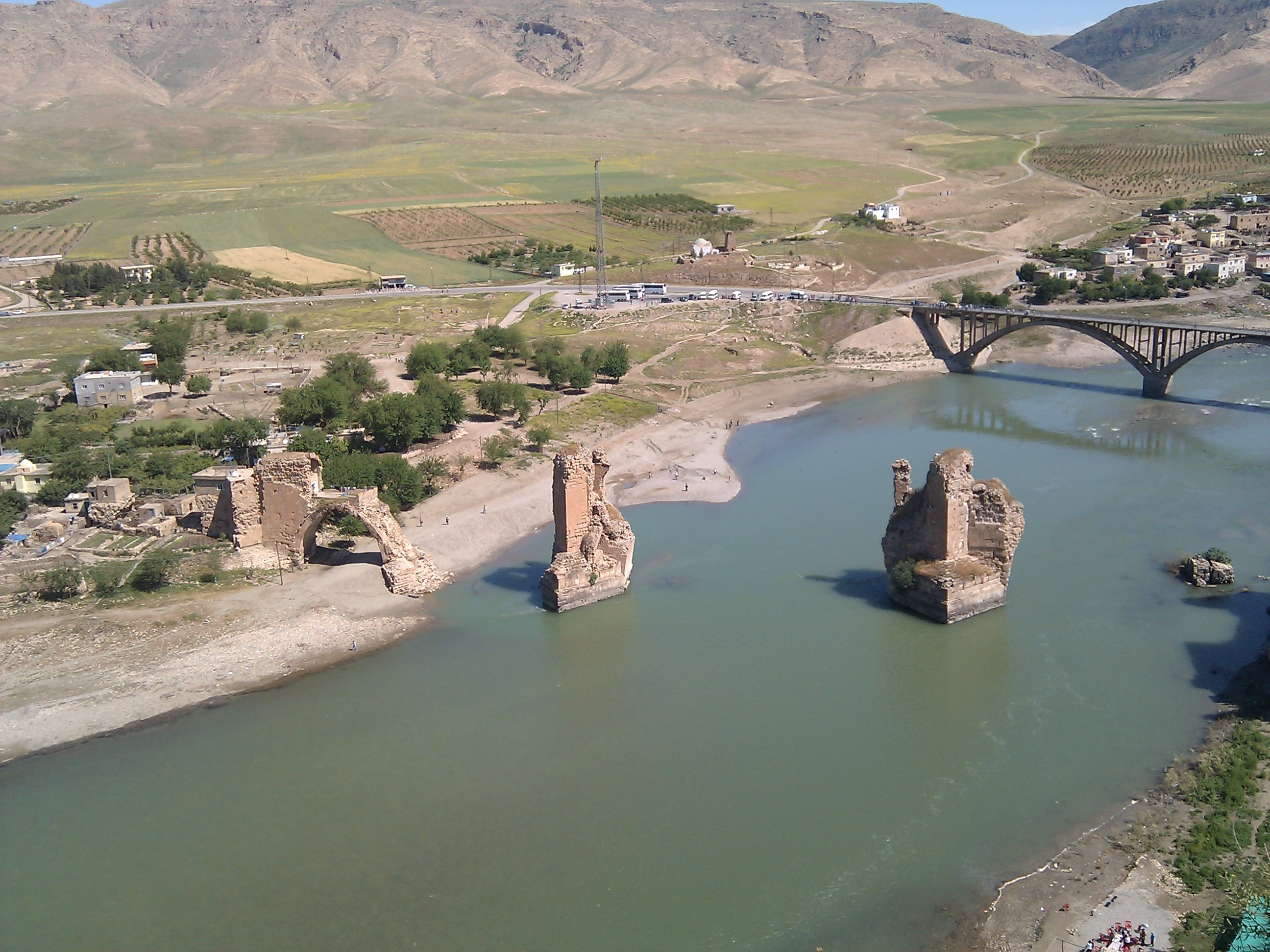 Tigris, Hasankeyf, Turkey, 2010